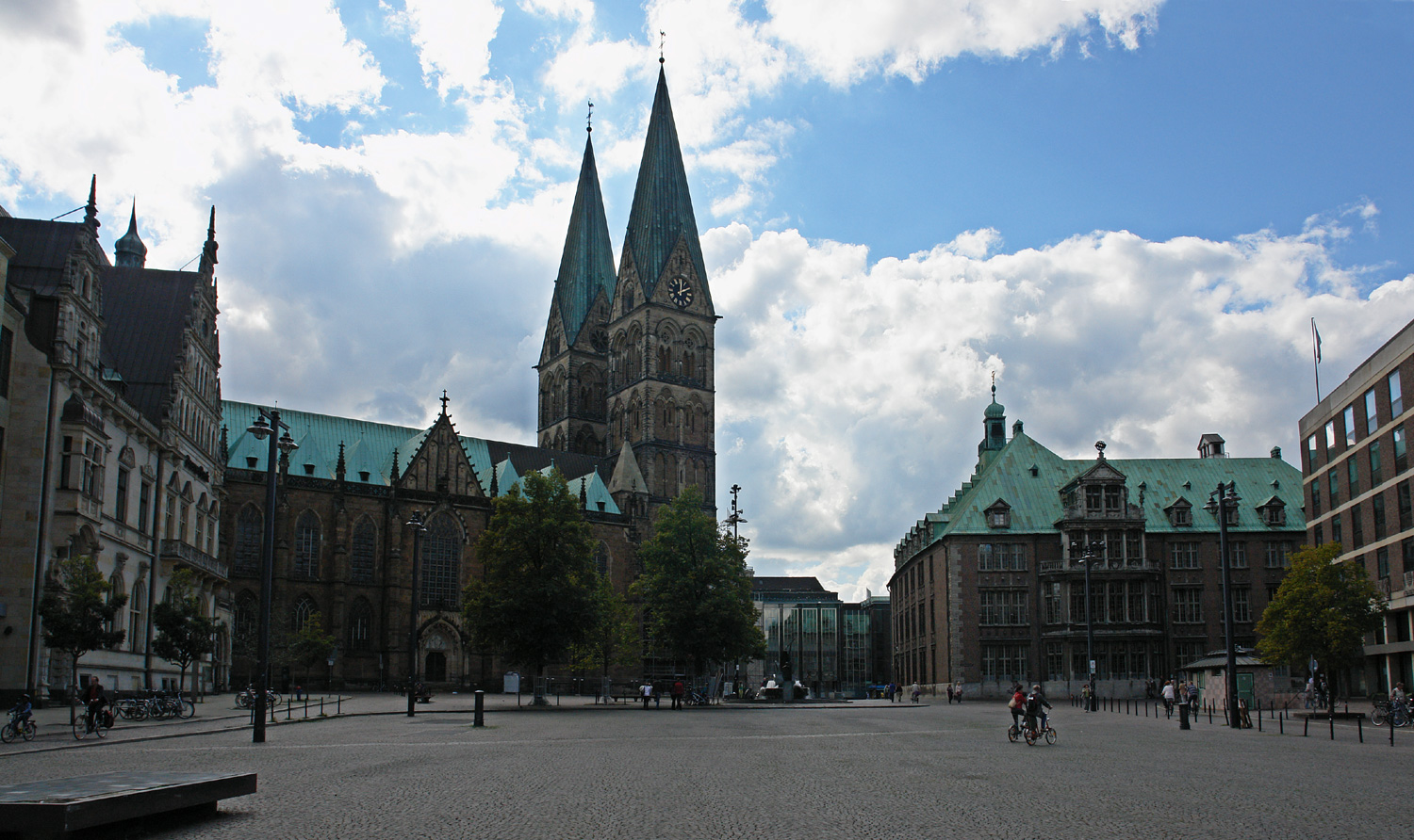 Domshof, v.l.: Bremer Bank, St.-Petri-Dom, Haus der Bürgerschaft, Neues Rathaus, Bremer Landesbank